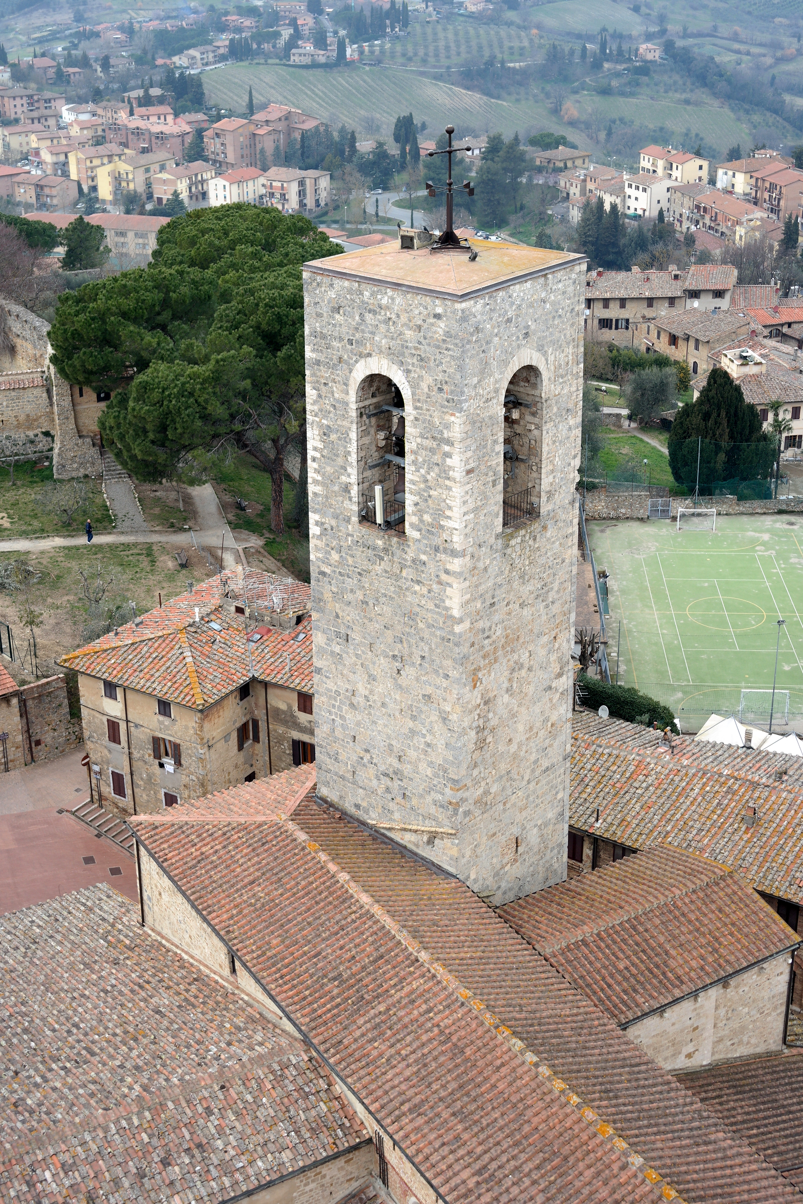 Campanile della Collegiata di San Gimignano vista dalla Torre Grossa